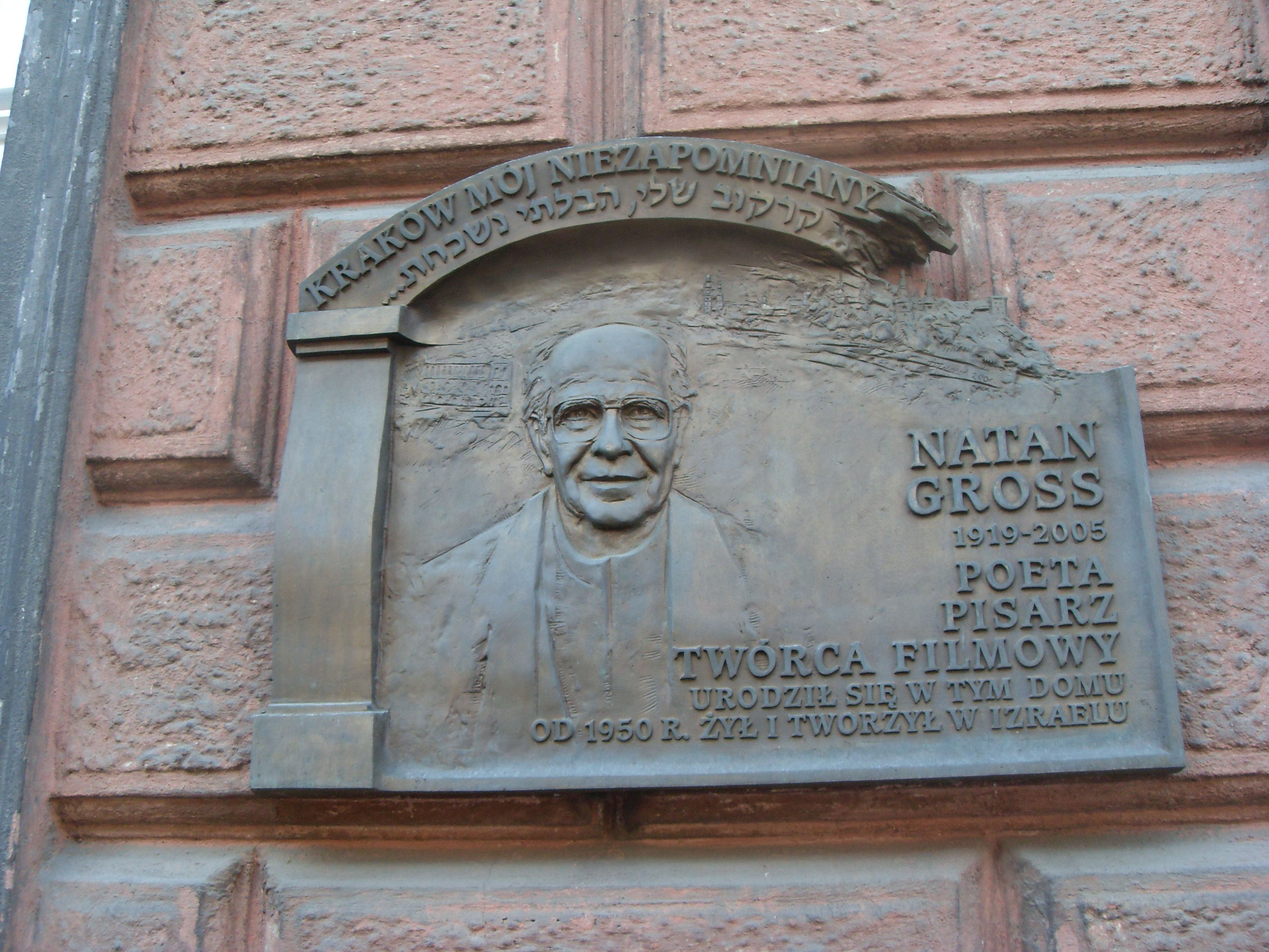 Tablica pamiątkowa ku czci Natana Grossa umieszczona na domu jego młodości przy ul. Sarego w Krakowie, odsłonięta w pierwszą rocznicę jego śmierci (5.10.2006).